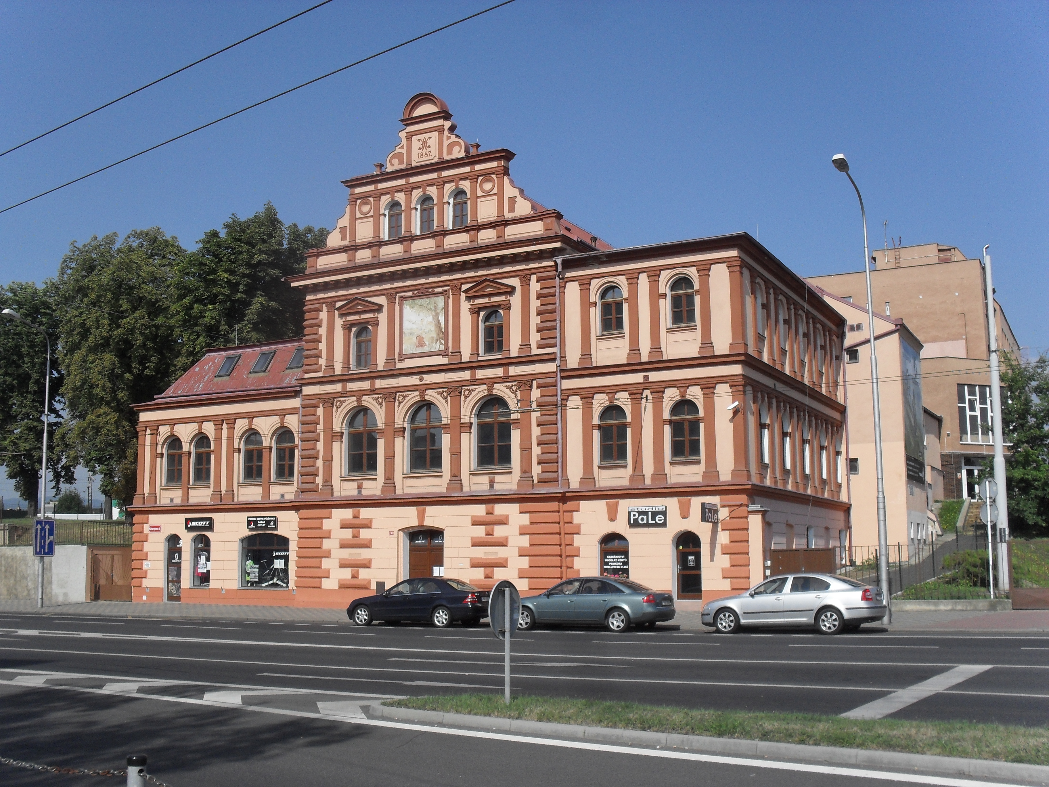 Společenský dům - dělnický dům Ritterburg (Teplice)- Masarykova třída 30/95, Teplice.